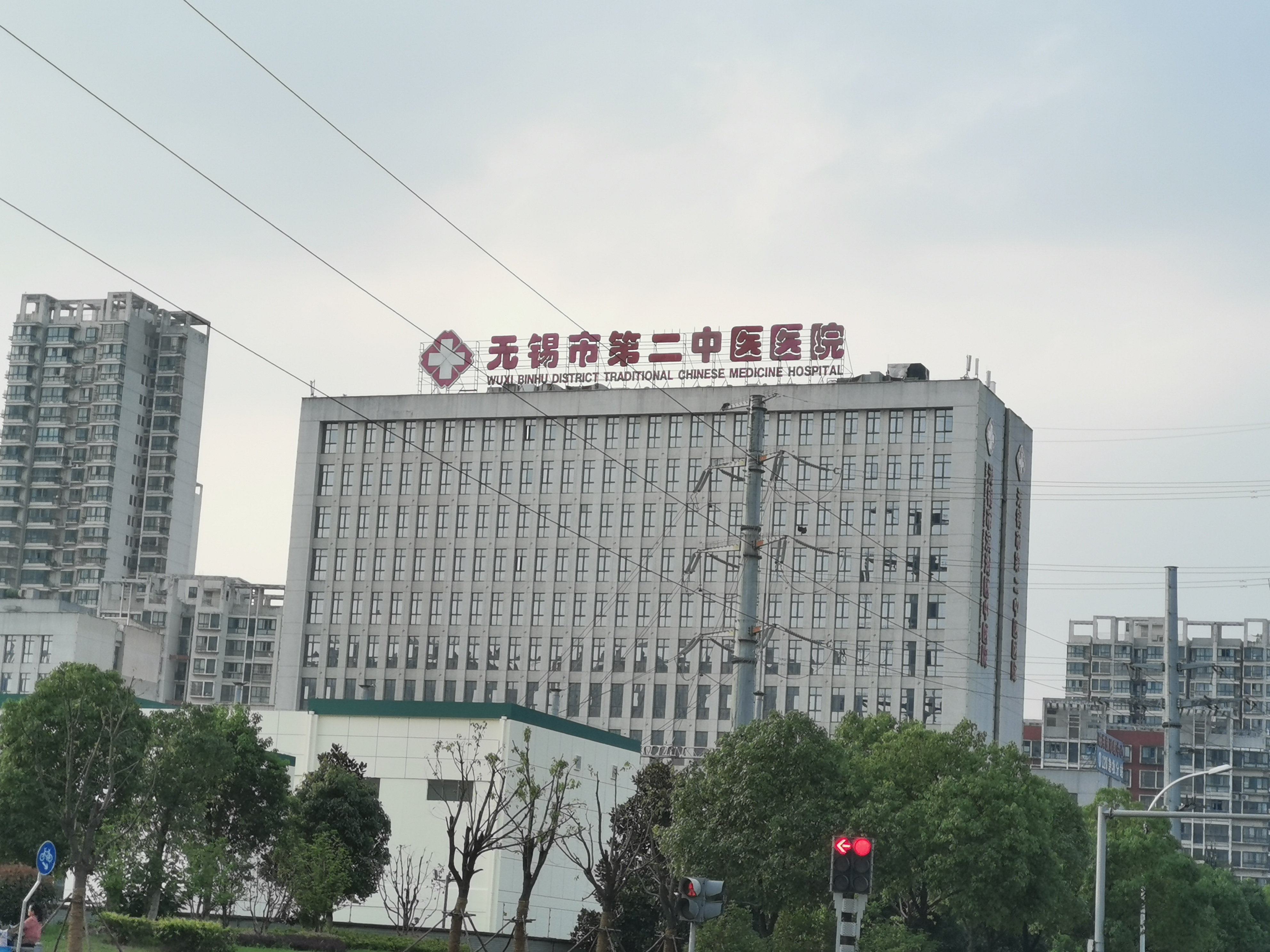 无锡市二中院